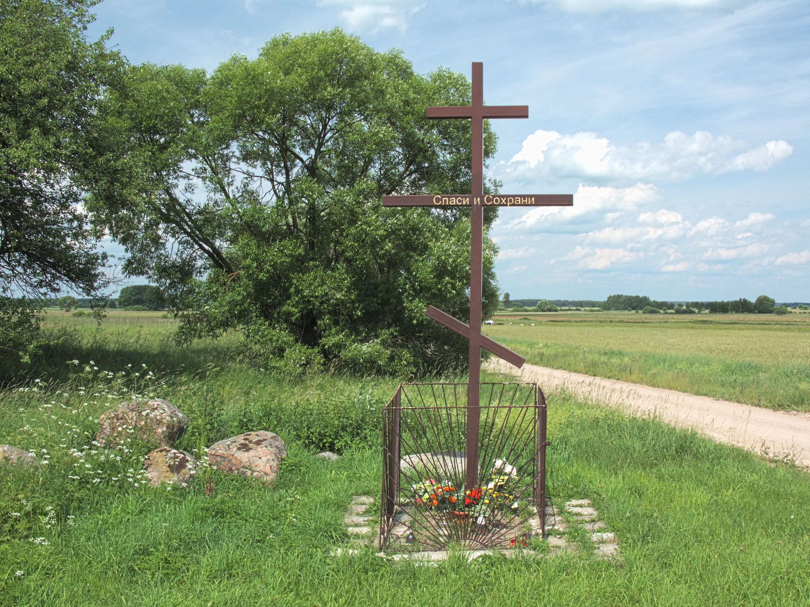 Krzyż wotywny w okolicy wsi Śnieżki.